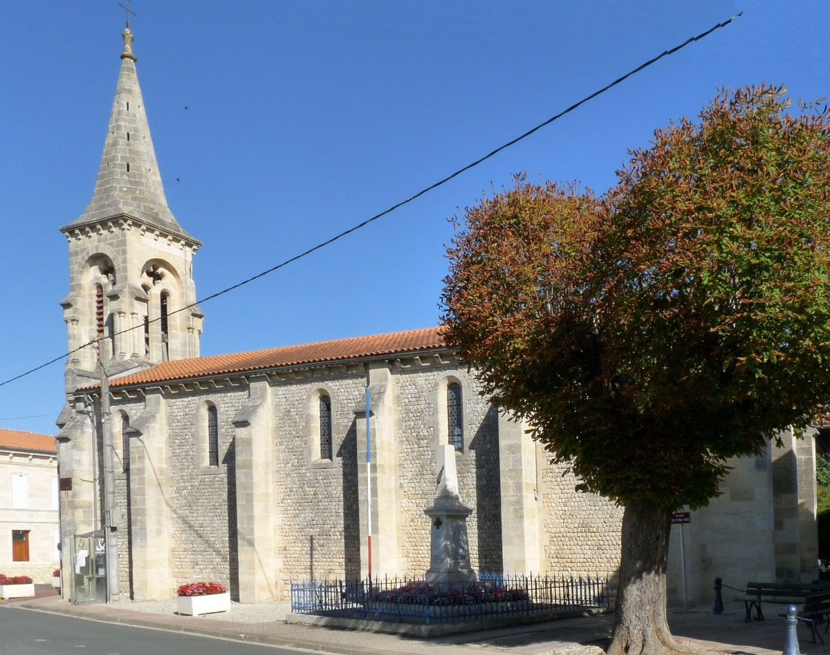 Eglise et monument aux morts de Couquèques, Gironde, France